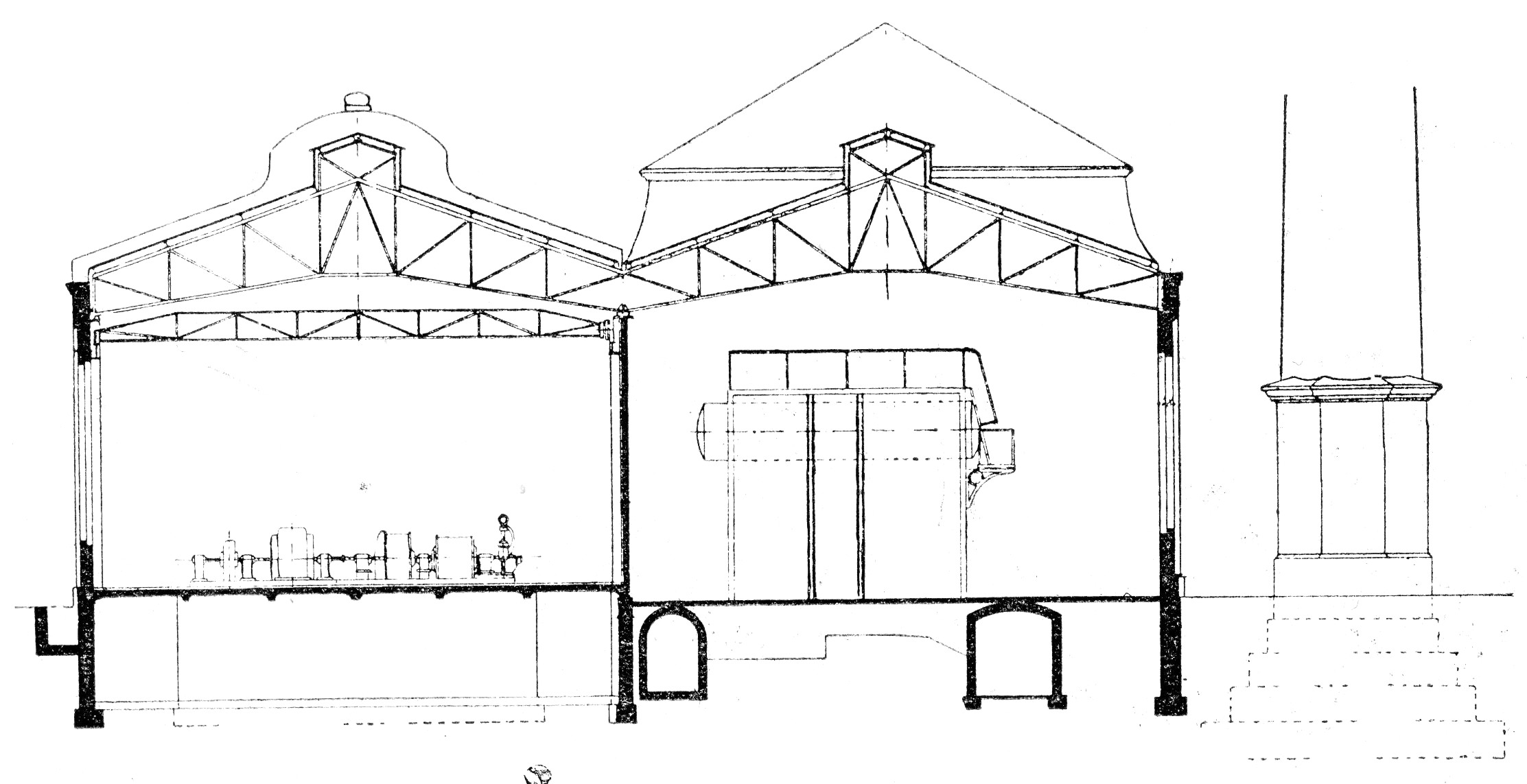 Kraftwerk Teltowkanal in Berlin-Zehlendorf, Querschnitt